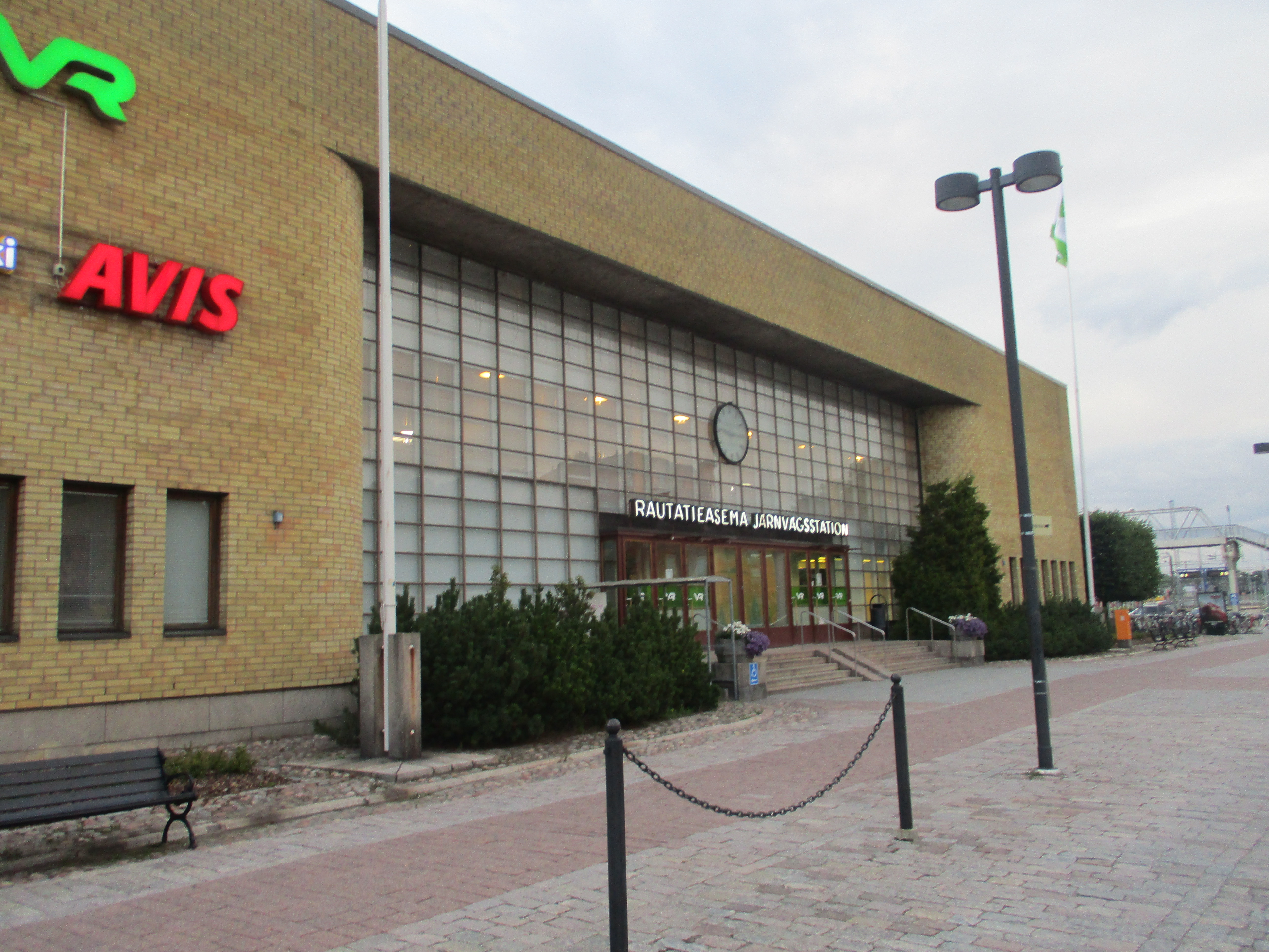 Turun päärautatieasema; railway station in Turku, Finland